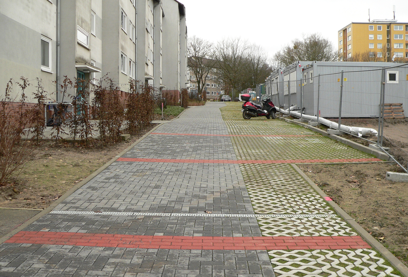 Rote Pflasterung zur Kennzeichnung von Fundamenten der Baracke 4 des KZ-Außenlagers Laagberg